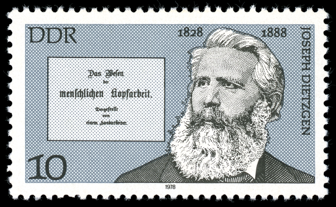 Ausgabepreis: 10 Pfennig First Day of Issue / Erstausgabetag: 18. Juli 1978 Auflage: 15.000.000 Entwurf: Gerhard Stauf Druckverfahren: Offsetdruck Michel-Katalog-Nr: Ländercode-MiNr: 2337